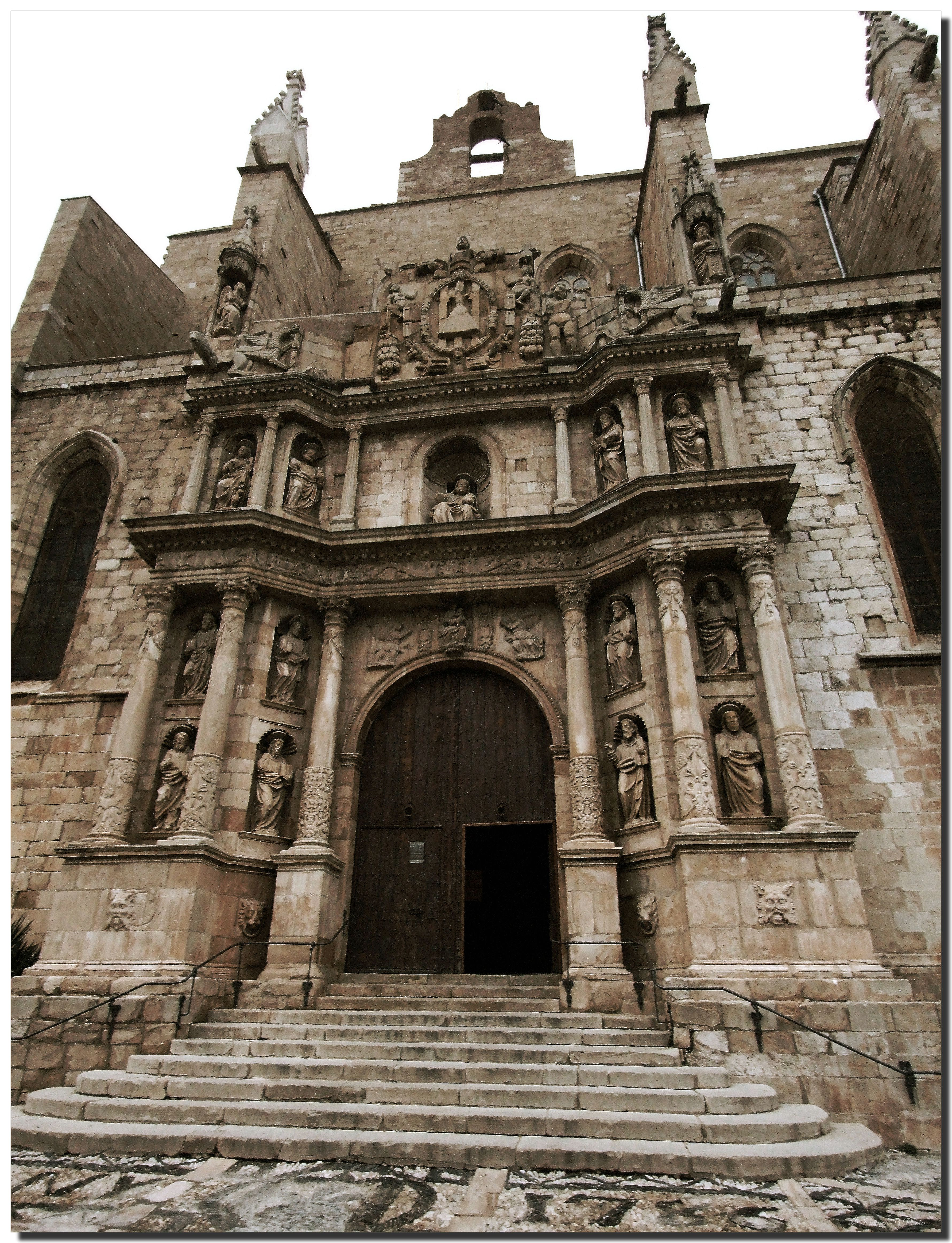 Església de Santa Maria la Major (Montblanc)